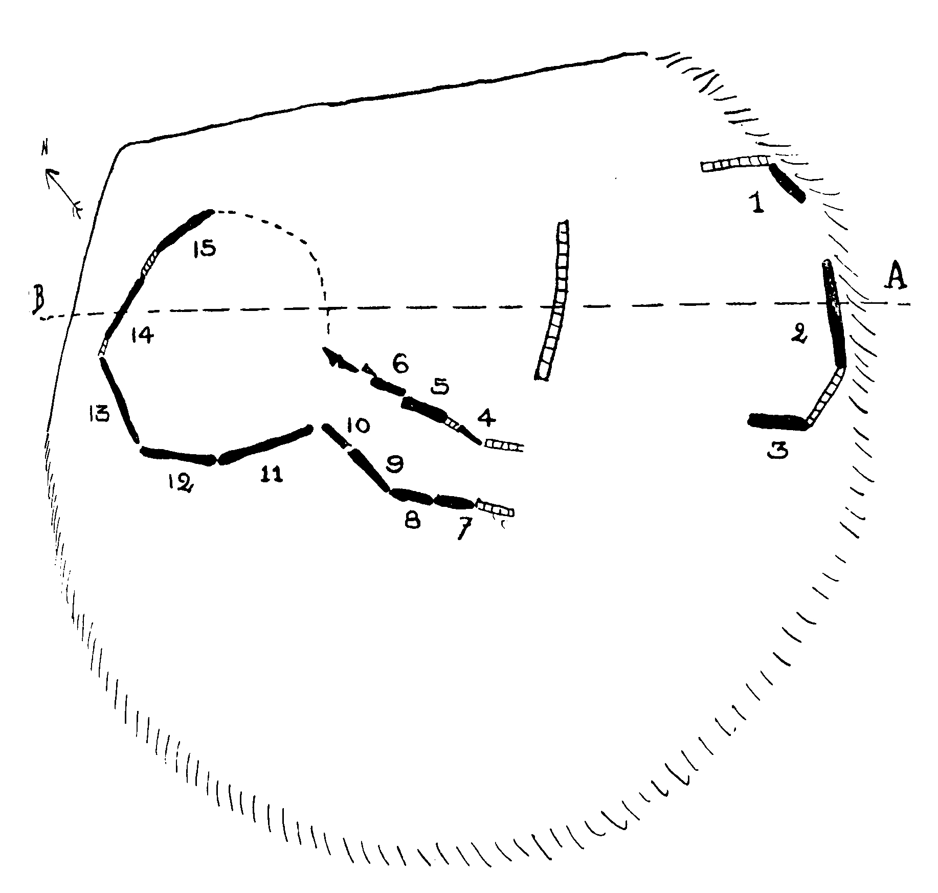 Plan du petit dolmen à couloir au nord de l'île Brunec, daté du néolithique, dessiné lors des fouilles par Marthe et Saint-Just Péquart en 1926 (article de 1927). Cf. Jacques Briard, Michel Gueguen et Charles-Tanguy Le Roux, « L'âge du Bronze aux Iles Glénan, Fouesnant, Finistère », dans AMARAI. Bulletin d'Information, vol. 2, 1989, p. 47 (en ligne). Nathalie Delliou, Frédéric Bioret, Albin Loussouarn, Réserve Naturelle Nationale de Saint-Nicolas des Glénan. Plan de gestion 2014-2024, Brest, octobre 2013, p. 22 (en ligne)